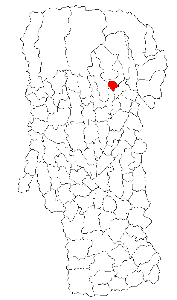 Categorie:Hărţi ale judeţului Argeş